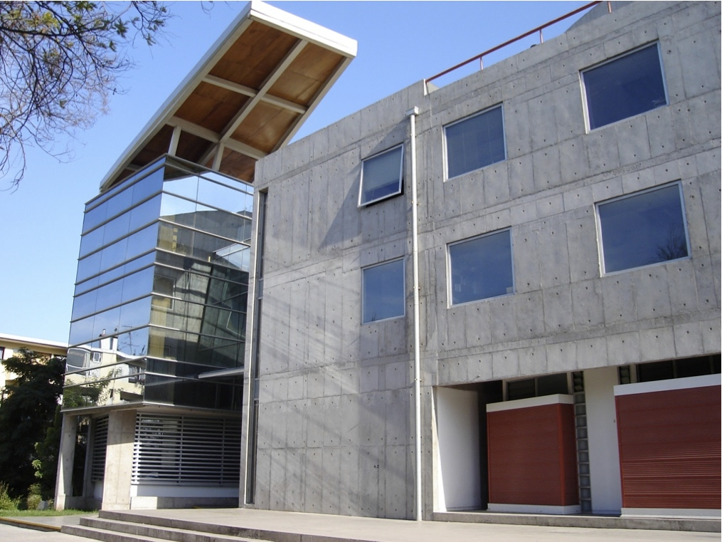 Centro de investigación, ubicado en campus Juan Gomez Millas, Universidad de Chile